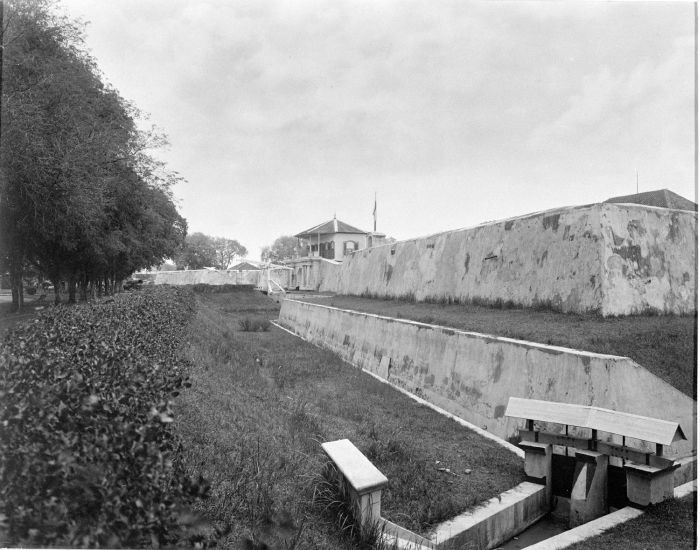 Foto. Muur van fort (benteng) te Soerakarta.